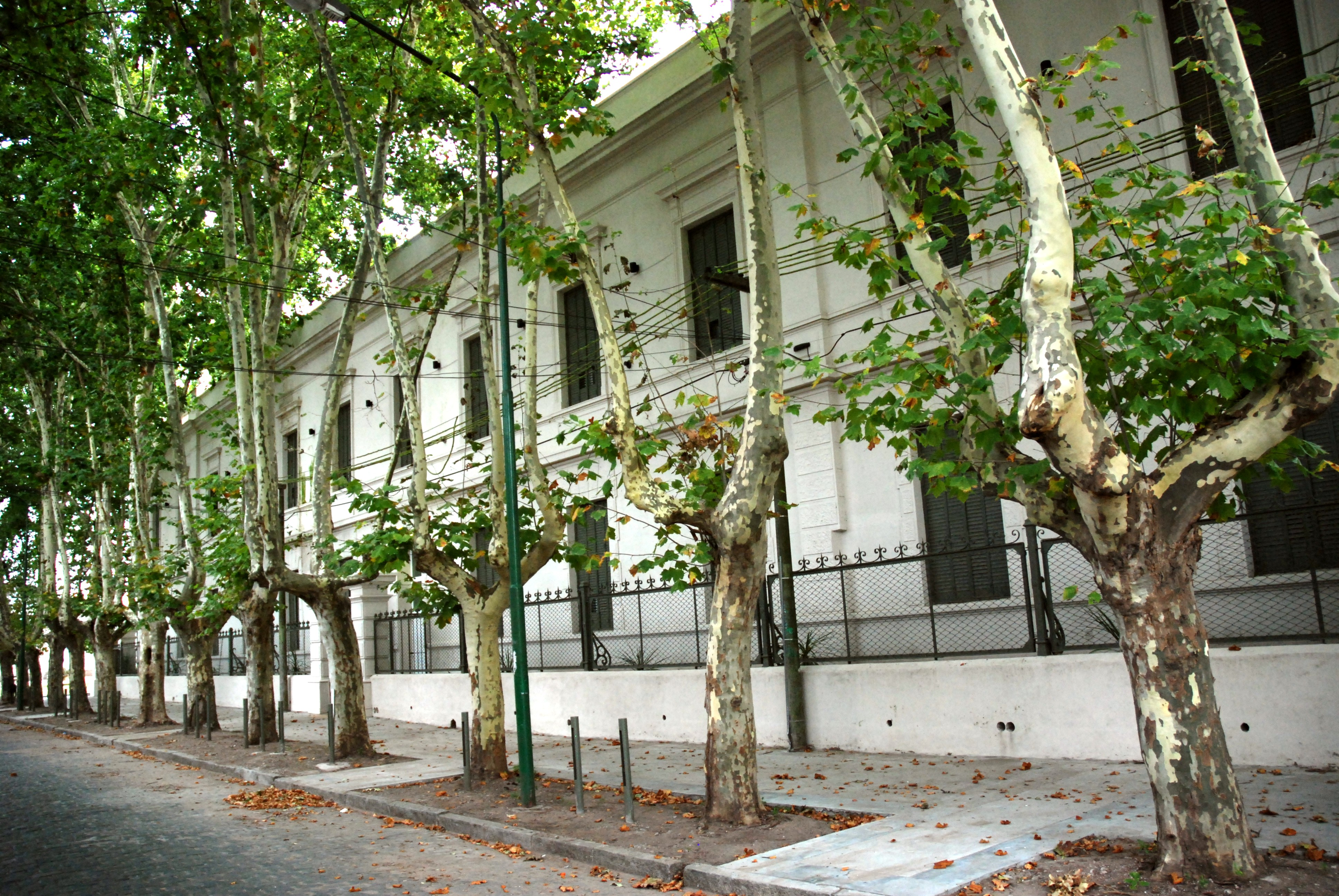 Fachada por calle Sarmiento del edificio Eva Perón de la UNNOBA (Universidad Nacional del Noroeste de la Provincia de Buenos Aires), en Junín, Argentina.